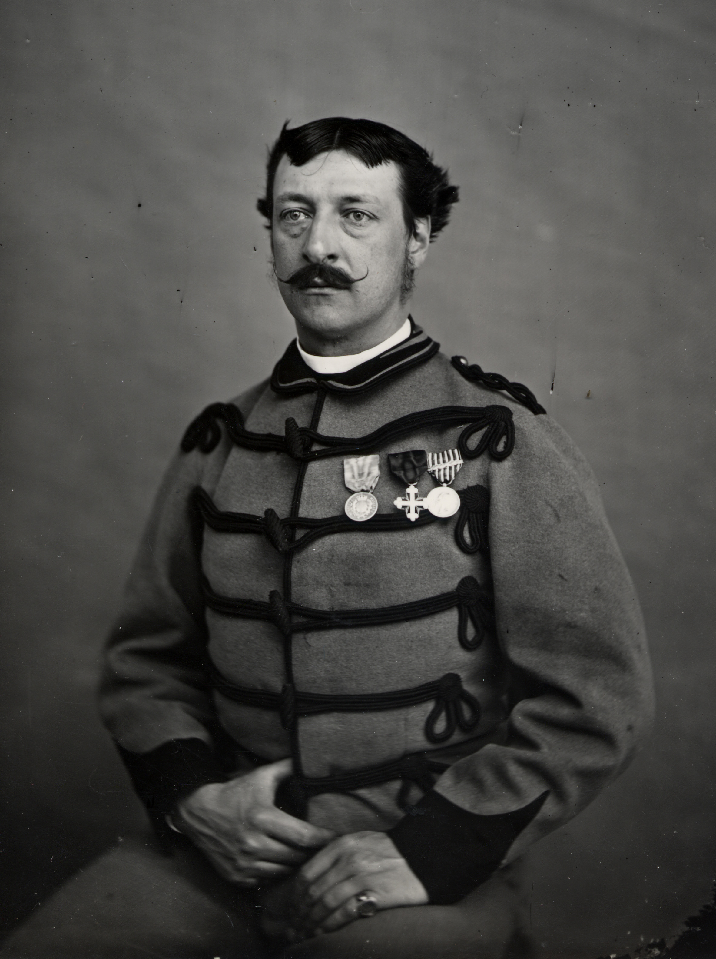 Frederick Stibbert (1838–1906), florentinischer Unternehmer und Kunstsammler, in Uniform. Fotografie, nach 1866 entstanden.